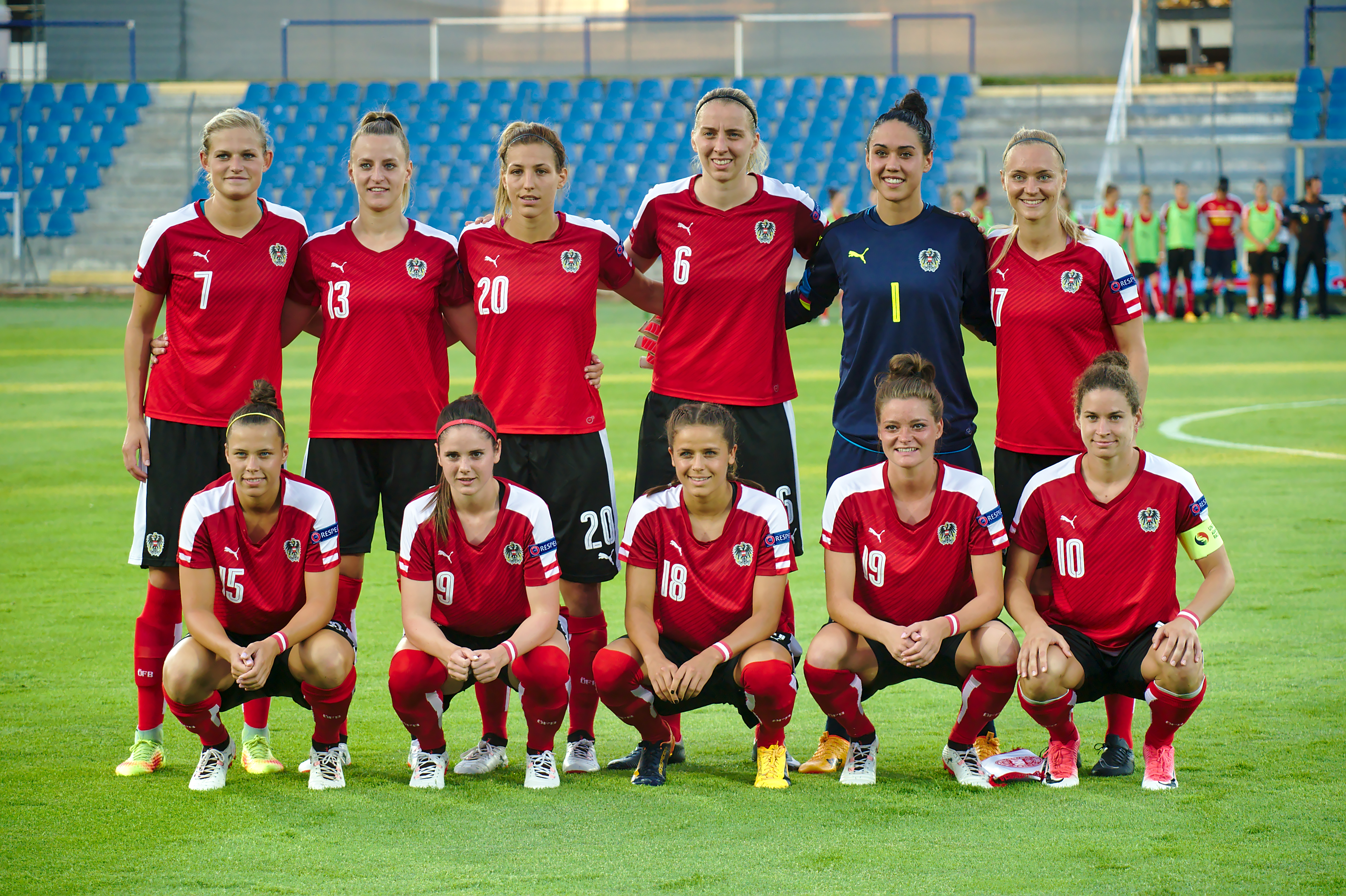 OeFB Frauenfussball Freundschaftsspiel - Oesterreich vs Daenemark. Bild zeigt 1. Reihe hockend v.l. Nicole Billa (AUT), Sarah Zadrazil (AUT), Laura Feiersinger (AUT), Verena Aschauer (AUT) und Nina Burger (AUT); 2. Reihe stehend v.l. Carina Wenninger (AUT), Virginia Kirchberger (AUT), Lisa Makas (AUT), Katharina Schiechtl (AUT), Manuela Zinsberger (AUT) und Sarah Puntigam (AUT).